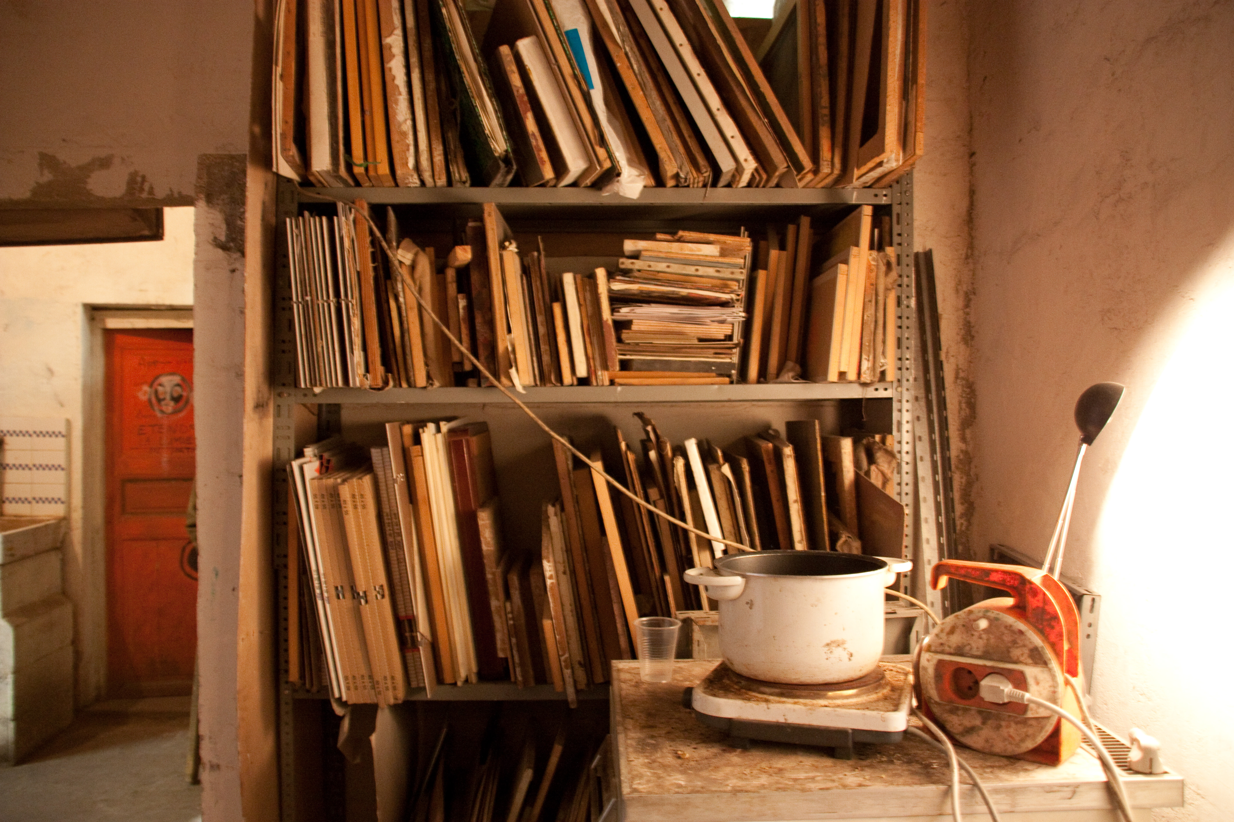 Atelier de peintre aux Frigos dans le 13ème arrondissement de Paris.